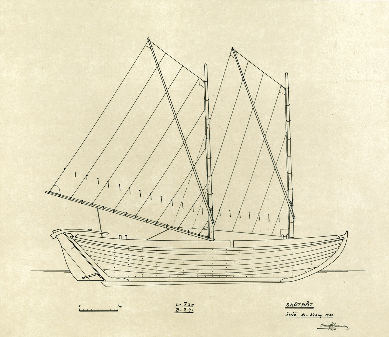 Fishing boat from Iniö, Finland. 1932.